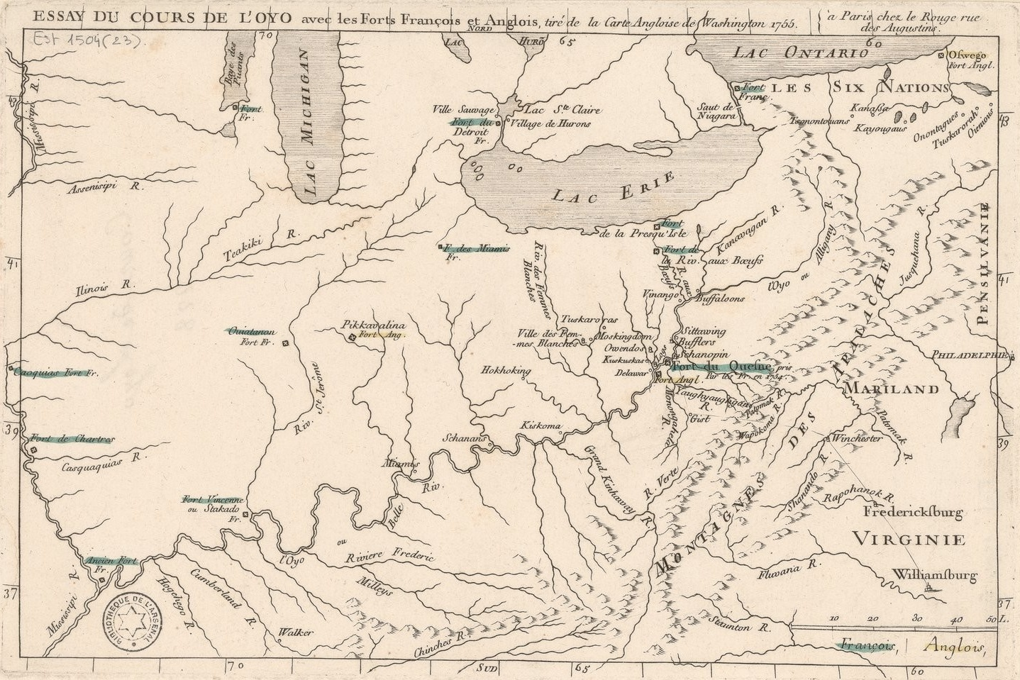 Essay du cours de l'Oyo avec les forts François et Anglois, tiré de la carte angloise de Washington. Carte publiée en 1755 à Paris, traduite d'après une carte anglaise. Collection géographique du marquis de Paulmy.